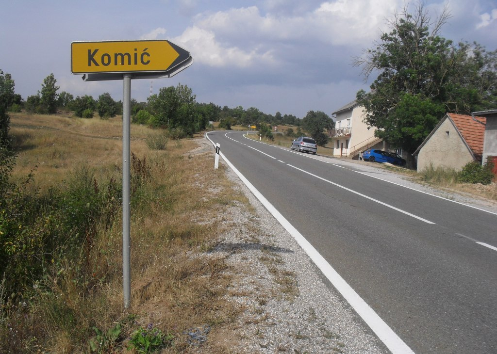 Скретање за Комић из засеока Опалићи, Лика.